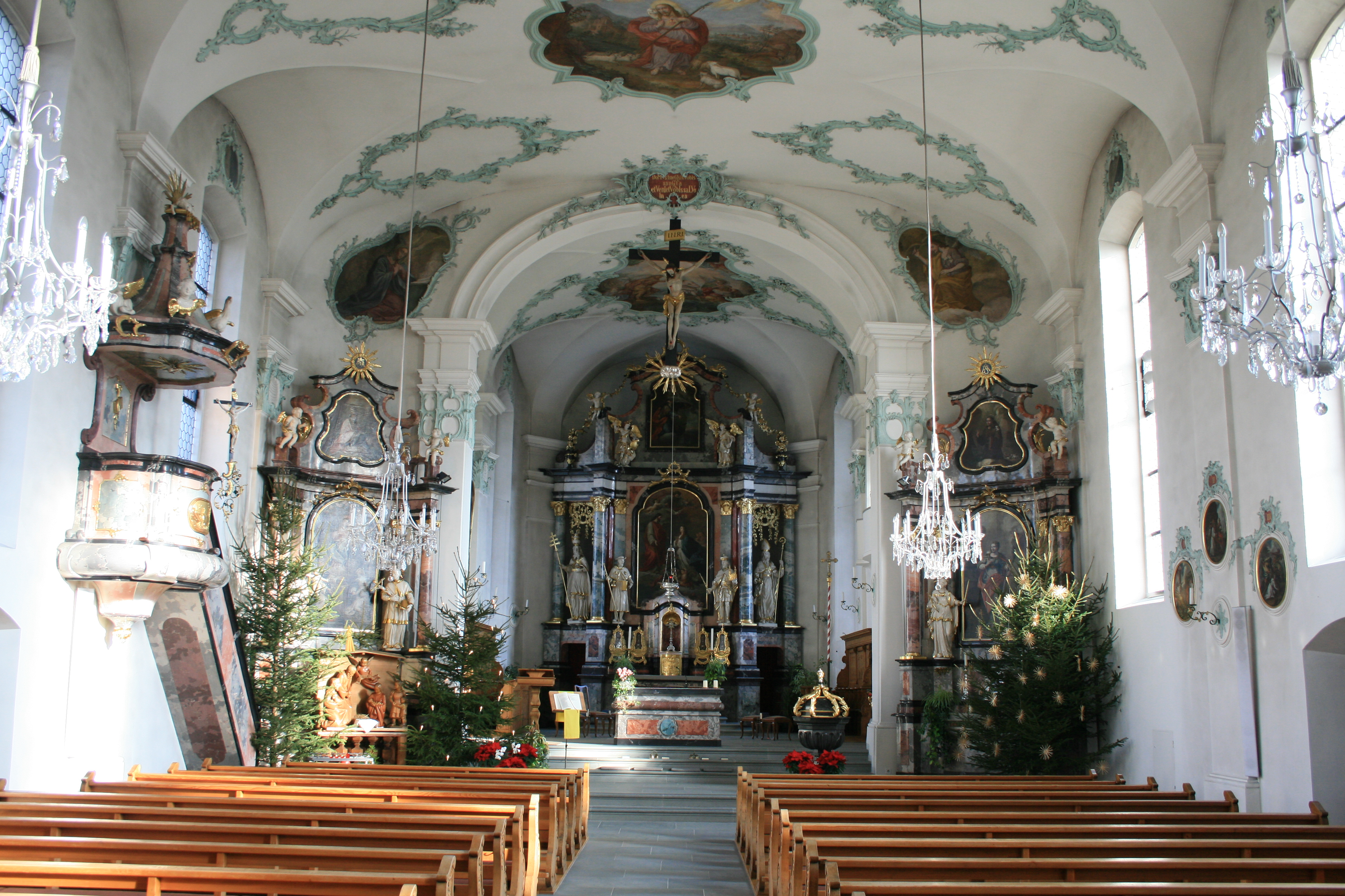 Dietwil